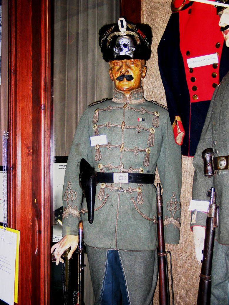 Huzaar - eigen foto